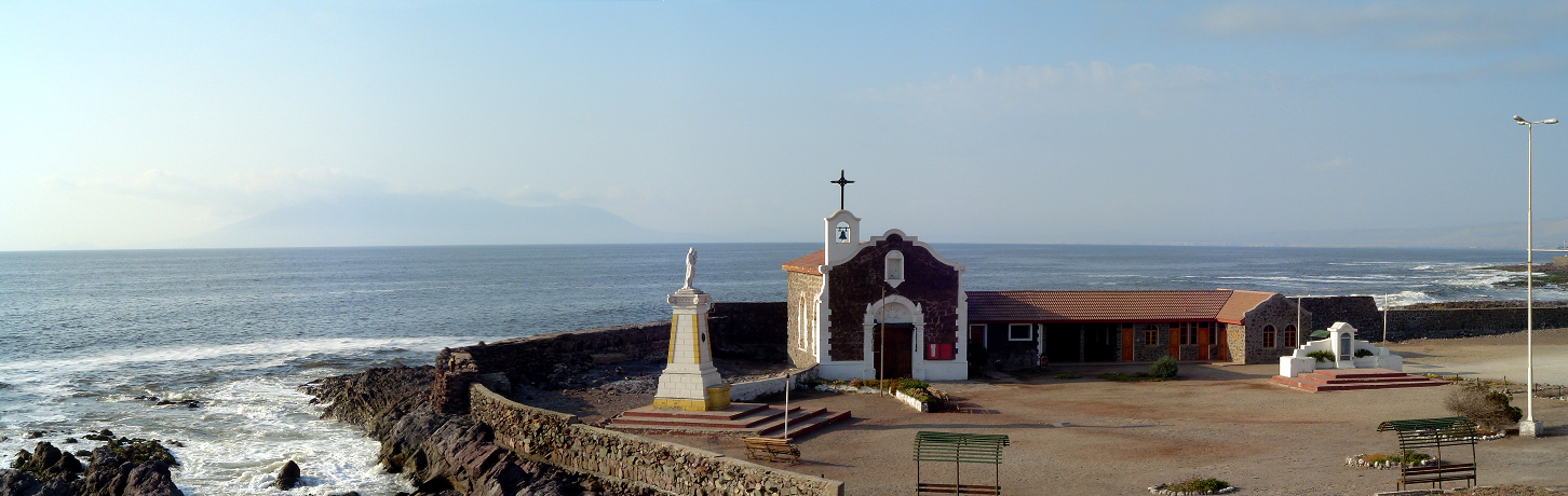 Capilla Militar Nuestra Señora del Carmen, ex-Sala de máquinas de la Fundición de Metales de Huanchaca, conocida como Casa de Piedra. Monumento Histórico Nacional. Antofagasta, Chile.Capilla Militar Nuestra Señora del Carmen